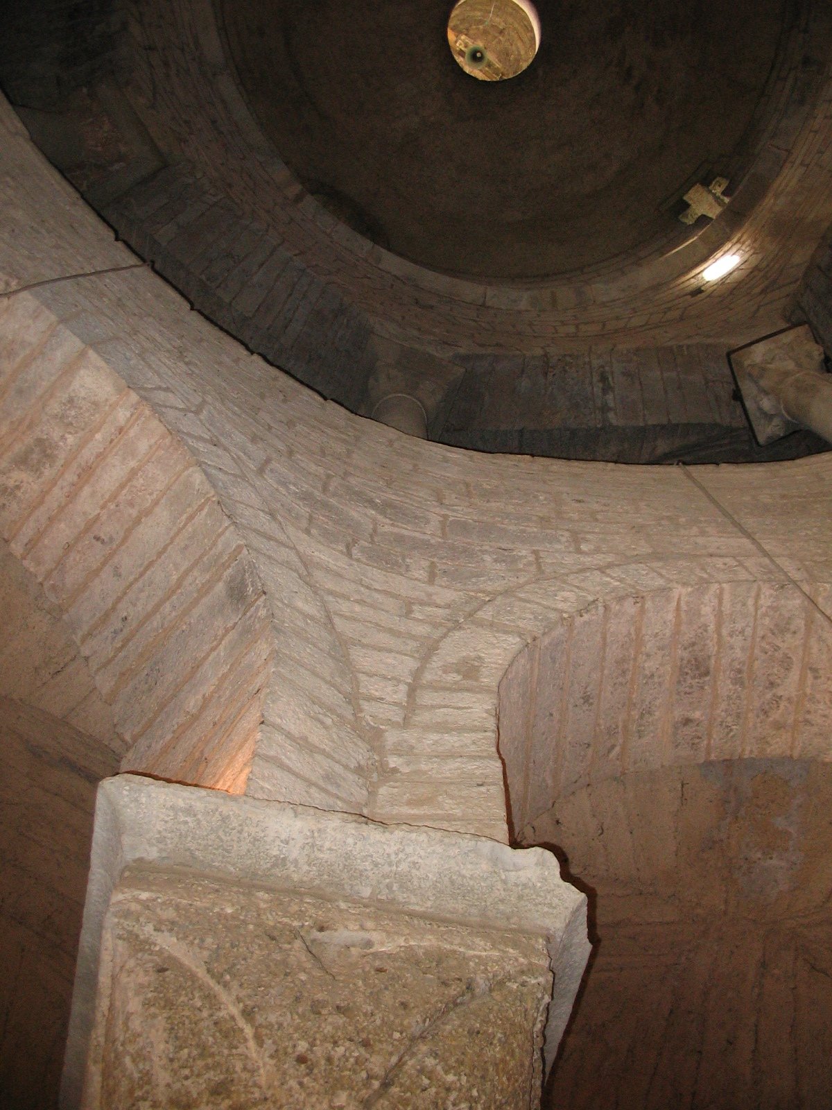 Autore Giorces. San Tomè, interno.